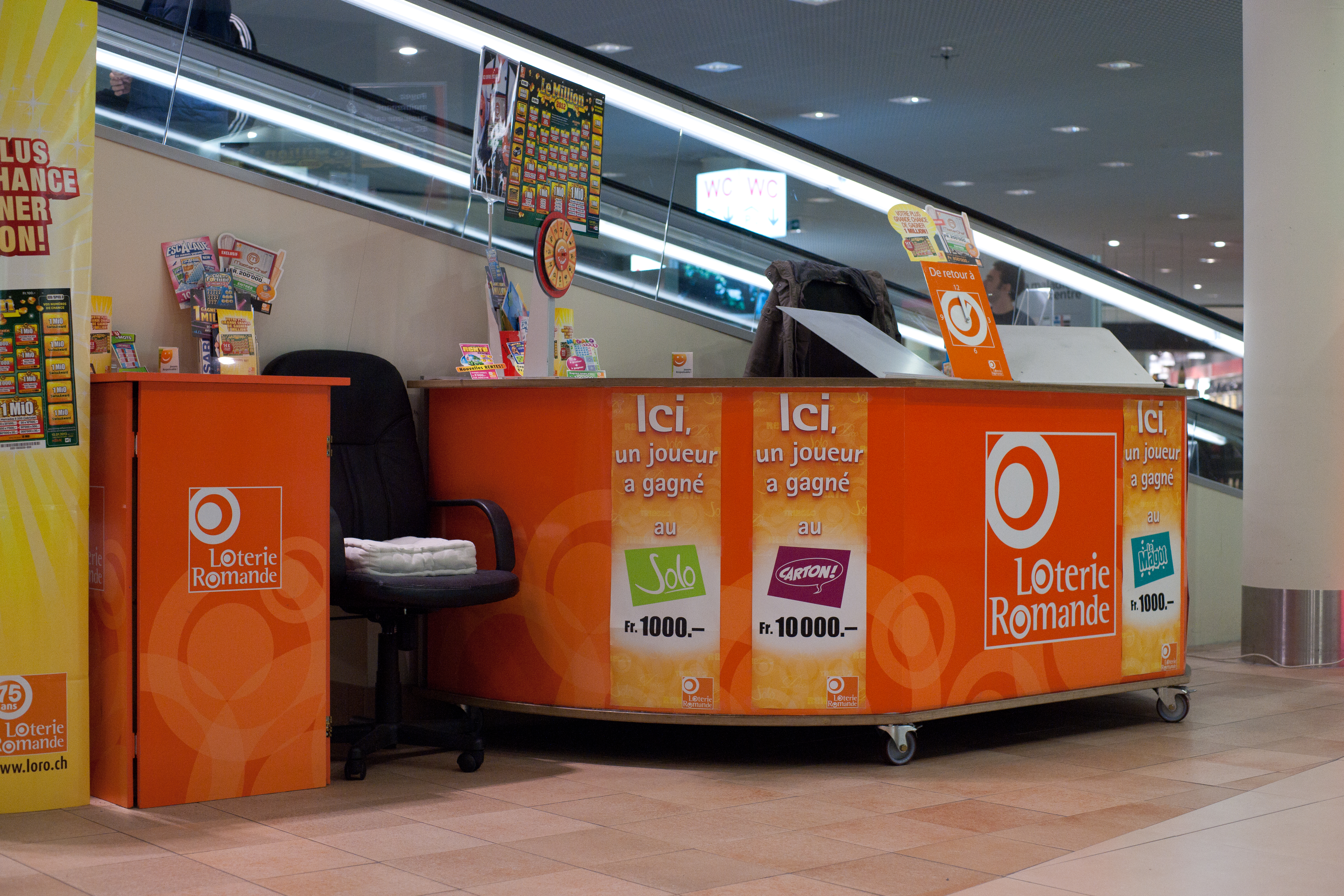 Stand de la Loterie romande au centre commercial de La Maladière à Neuchâtel.